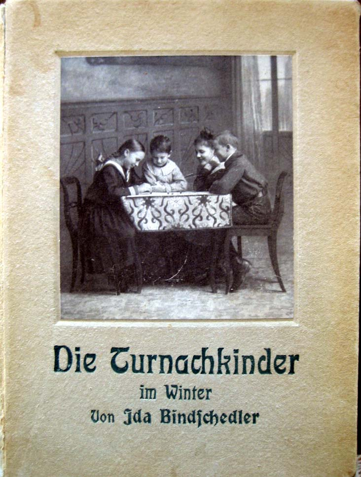 Titelbild von 'Tunachkinder im Winter', um 1920